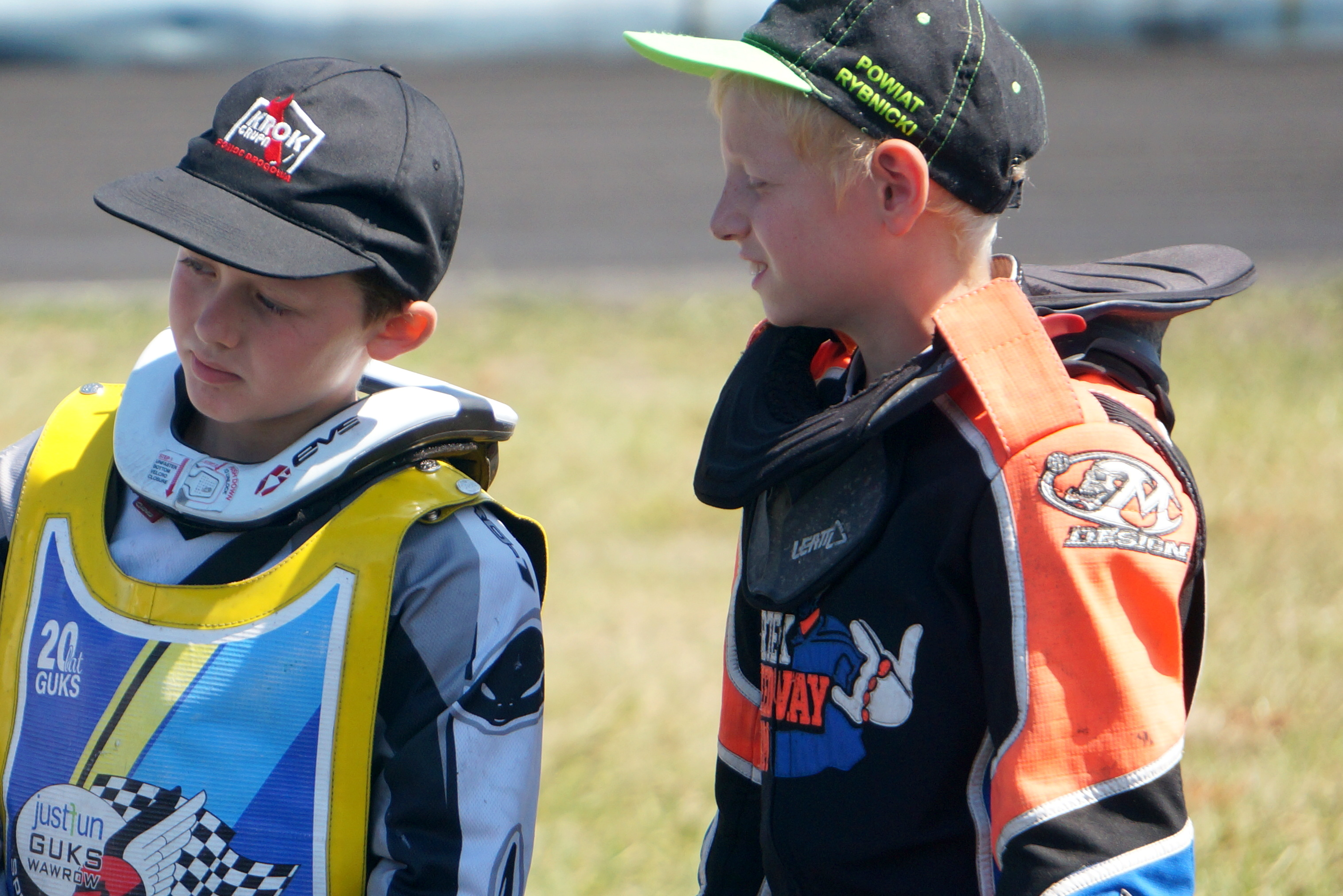 Najmłodsi żużlowcy w kołnierzach ochronnych (miniżużel), również powszechnie stosowanych przez zawodników ligowych